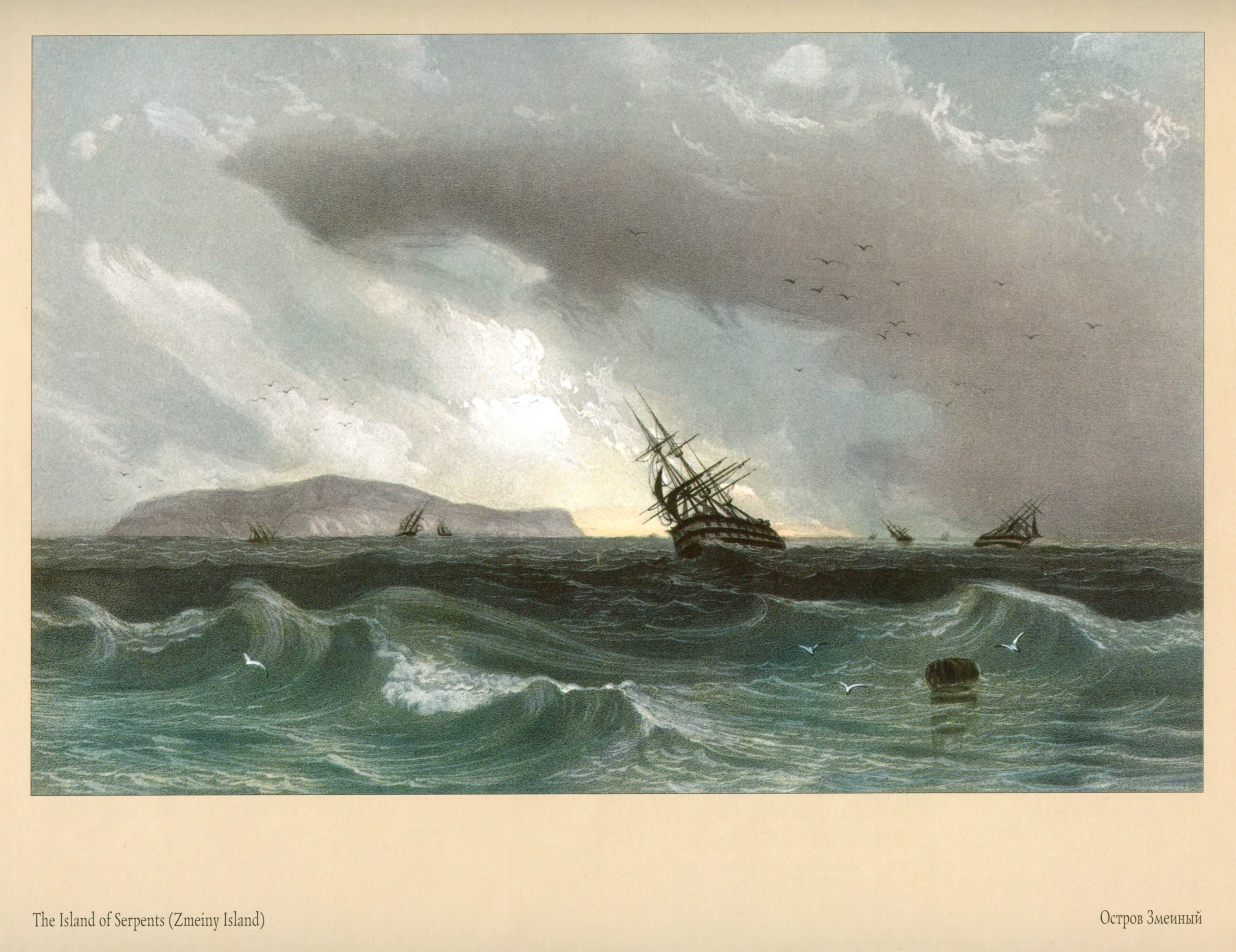 Карло Боссоли. Остров Змеиный